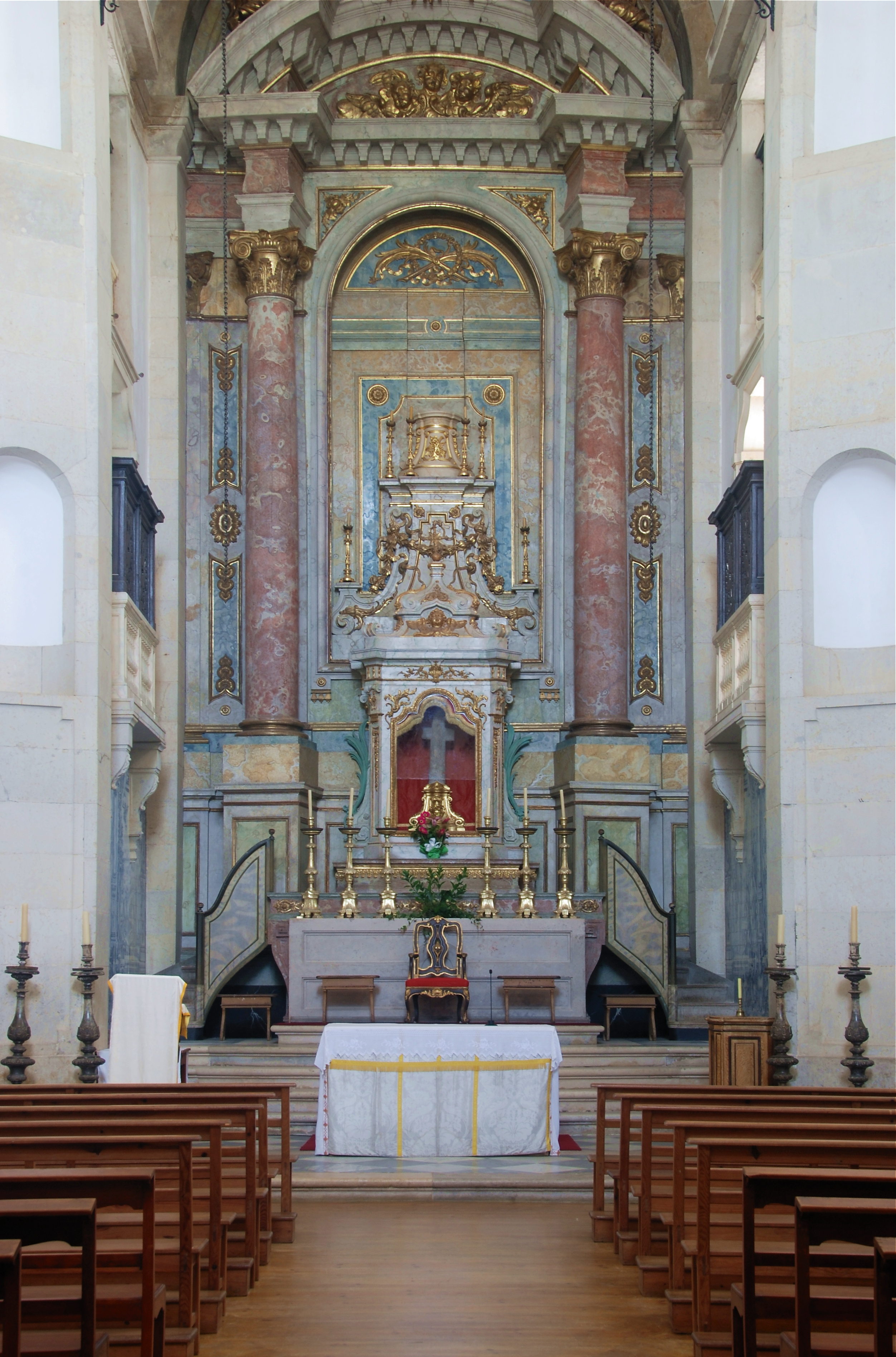 Sanctuary of Senhor Jesus da Pedra, Óbidos, Portugal